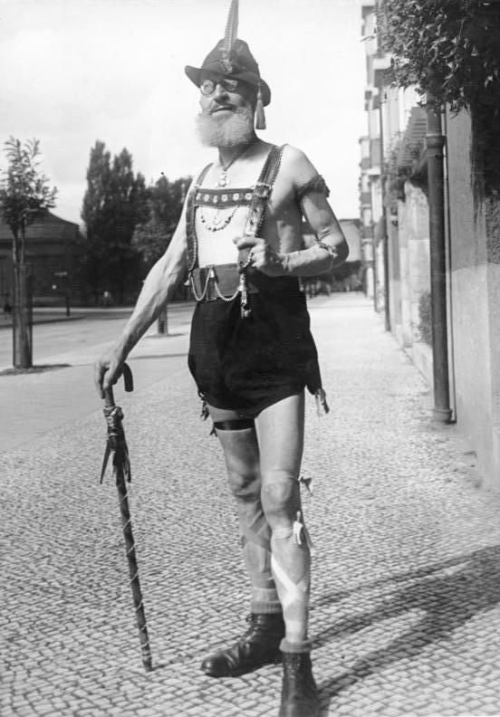 Ein origineller Globetrotter! Das Berliner Original Heinrich Hoffmann, läuft Sommer und Winter in diesem originellen Kostüm einher und erregt bei seinem Erscheinen die Heiterkeit der Berliner.